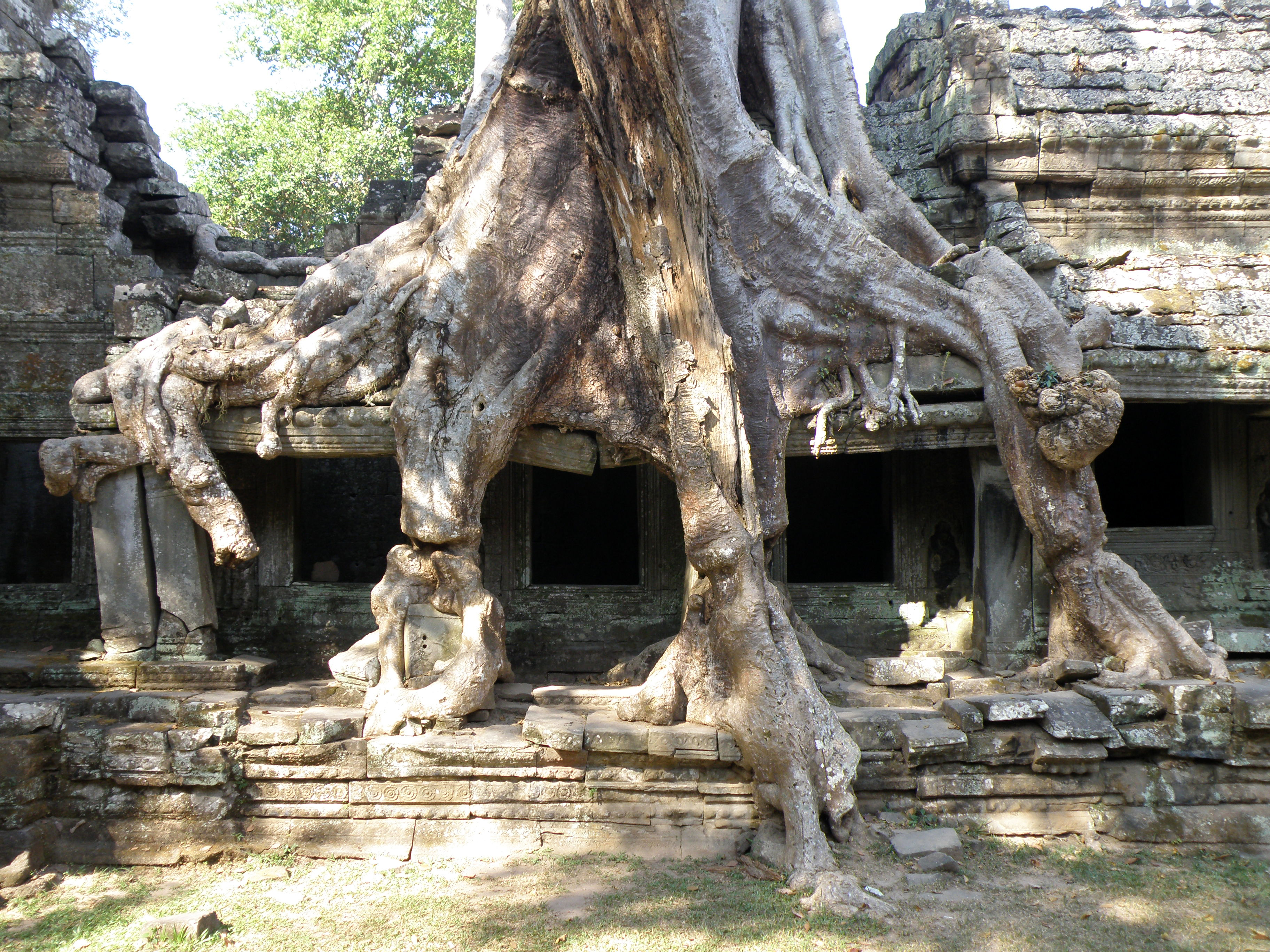 Cambodge - Angkor - Le PreahKhan